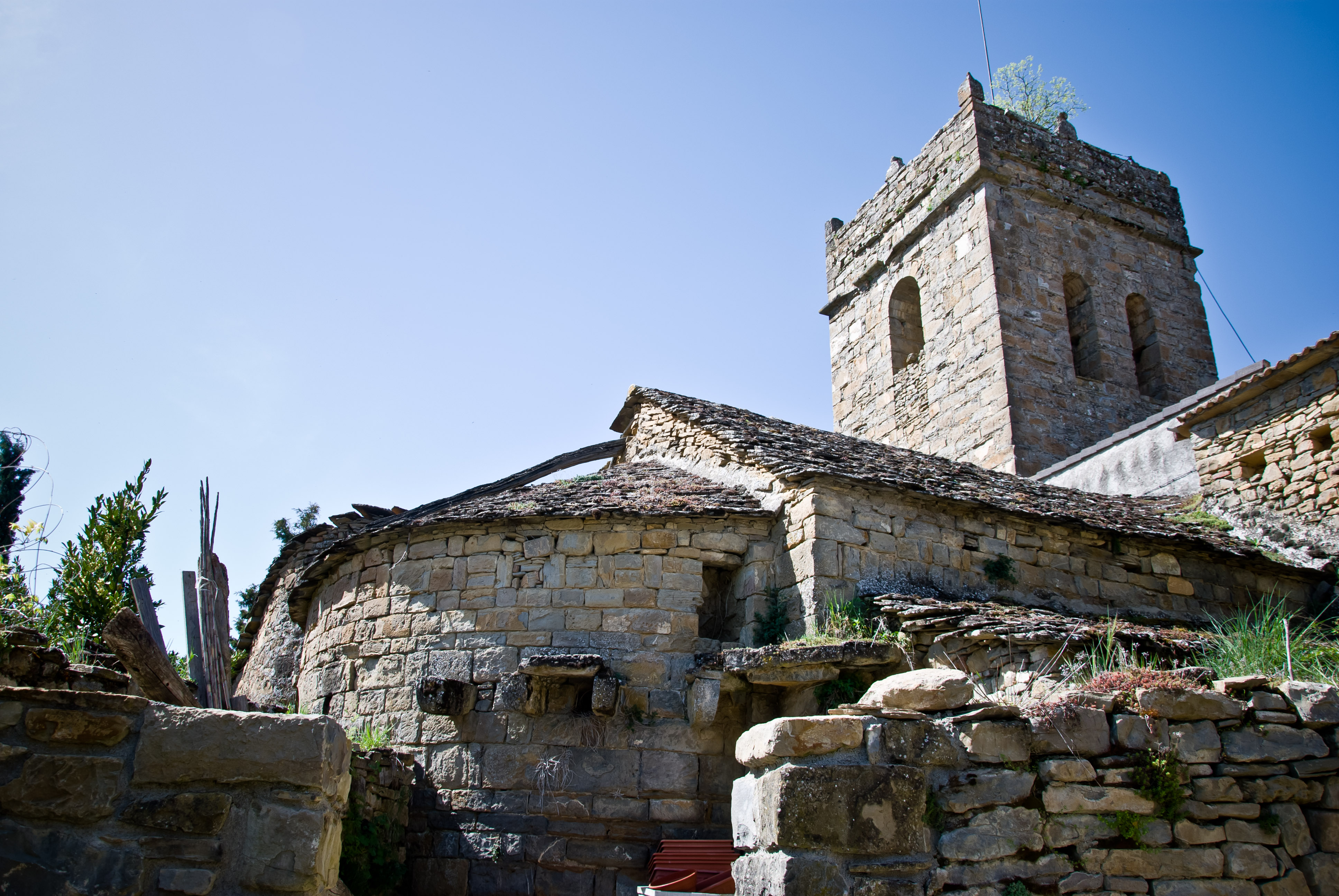 Iglesia, abside y otras construcciones anejas